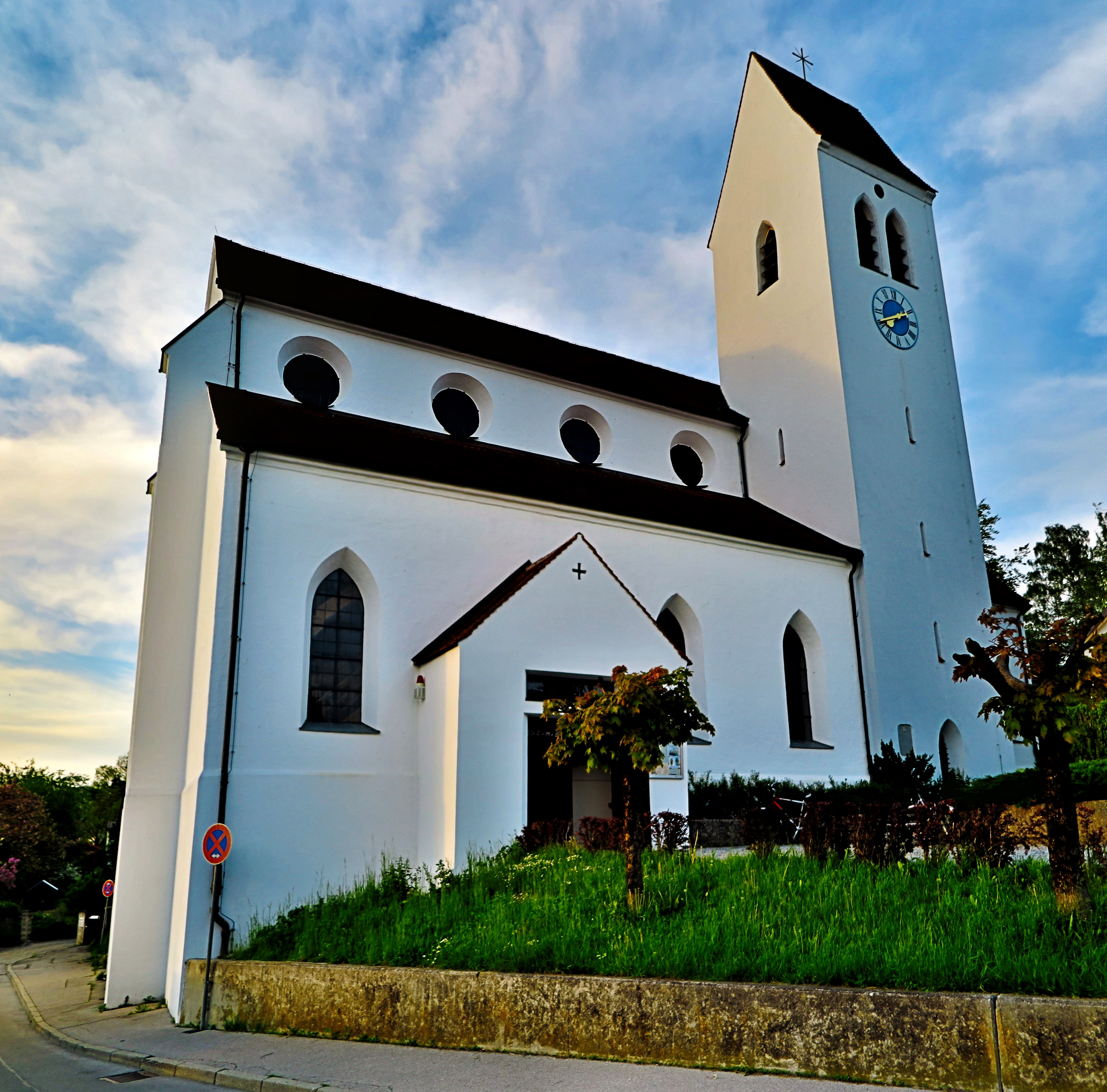 Deutschland, Bayern, Oberbayern, Landkreis Starnberg, Gemeinde Gilching, Pfarrkirche St. Vitus in der Schulstraße